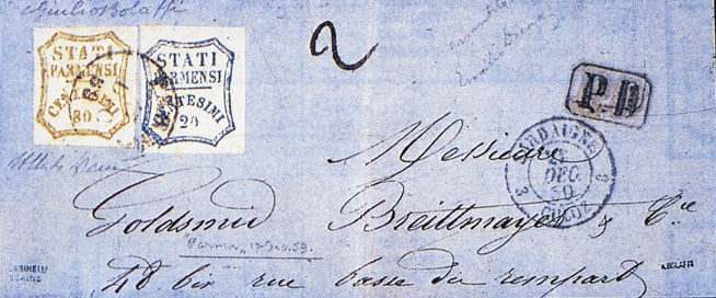 busta affrancata con l’80 centesimi di Parma, la massima rarità della filatelia italiana